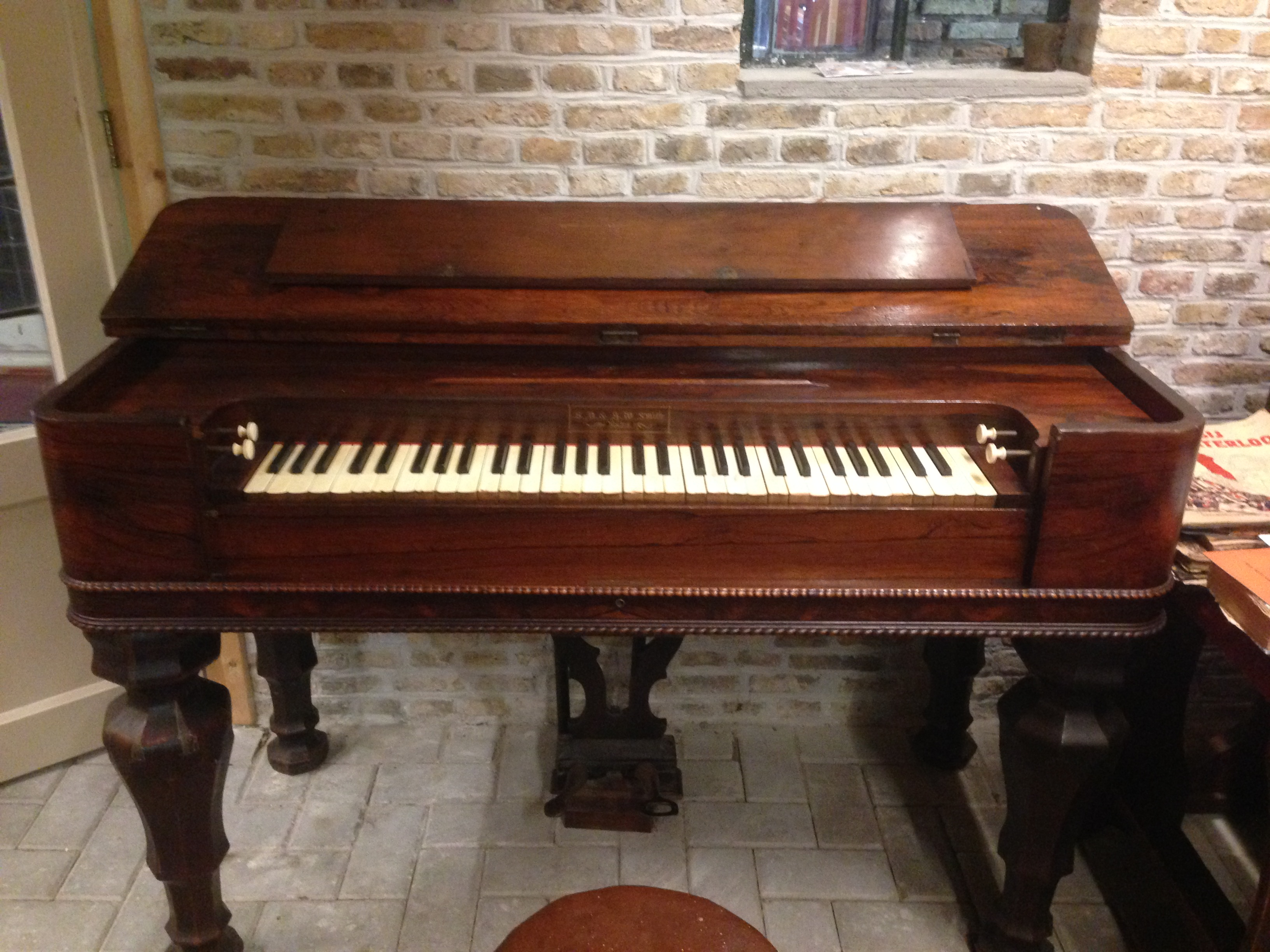 Harmonium Museum in Paasloo, Overijssel, Netherlands